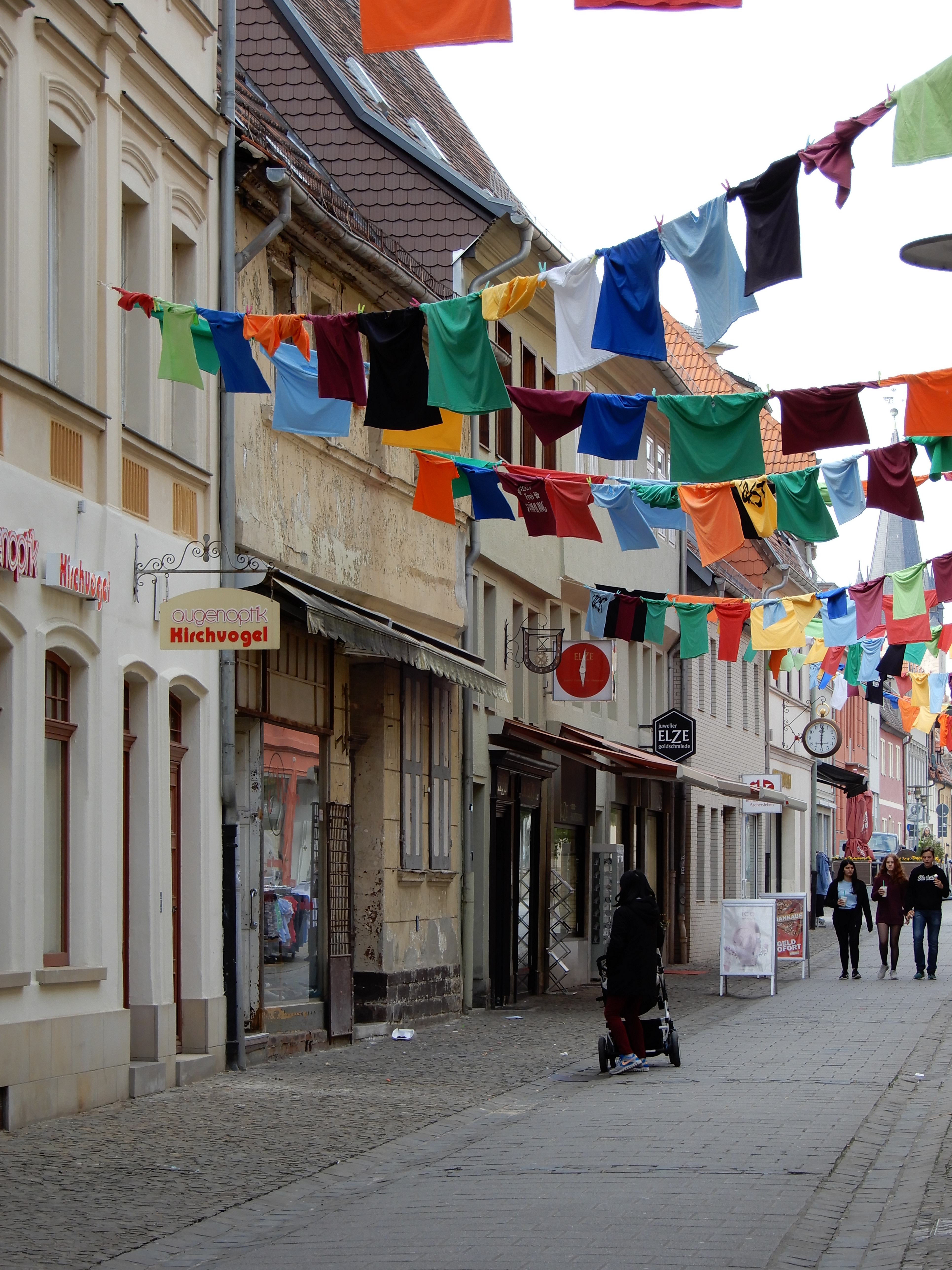 Gebäude Krügerbrücke 9-13 in Aschersleben